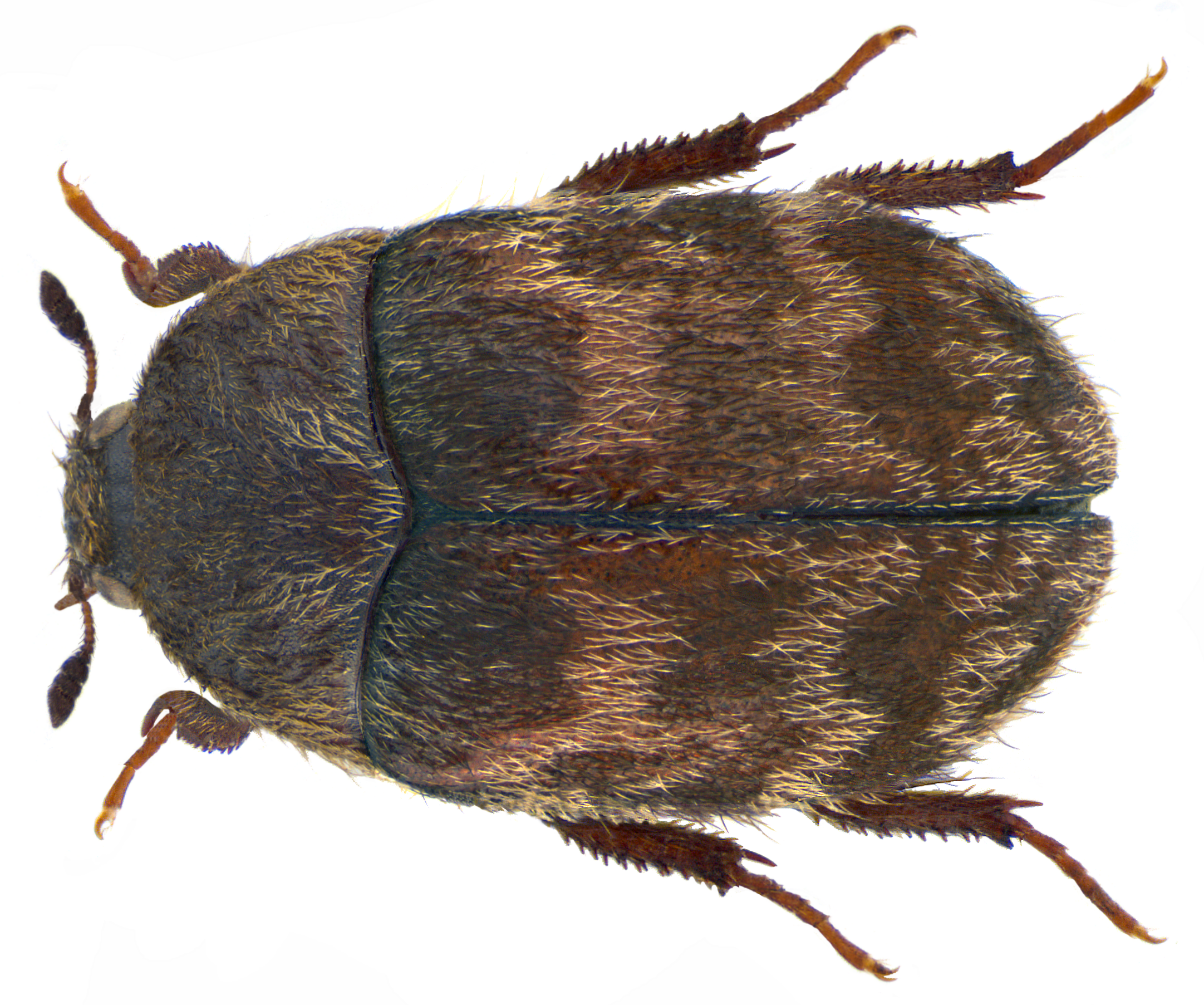 Family: Dermestidae Size: 4,1 mm Location: Tunisia, Hammamet, environment Club Aldiana leg. U.Schmidt, 26.V.-1.VI.1993; det. J.Háva, 2013 Photo: U.Schmidt, 2013